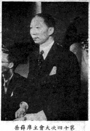 第一屆國民大會專輯圖片